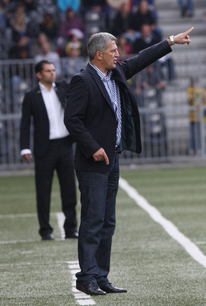 Vladimir Petkovic bei einem Spiel von den BSC Young Boys gegen den FC St. Gallen, hinten Uli Forte